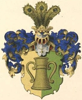 Knorringi suguvõsa aadlivapp